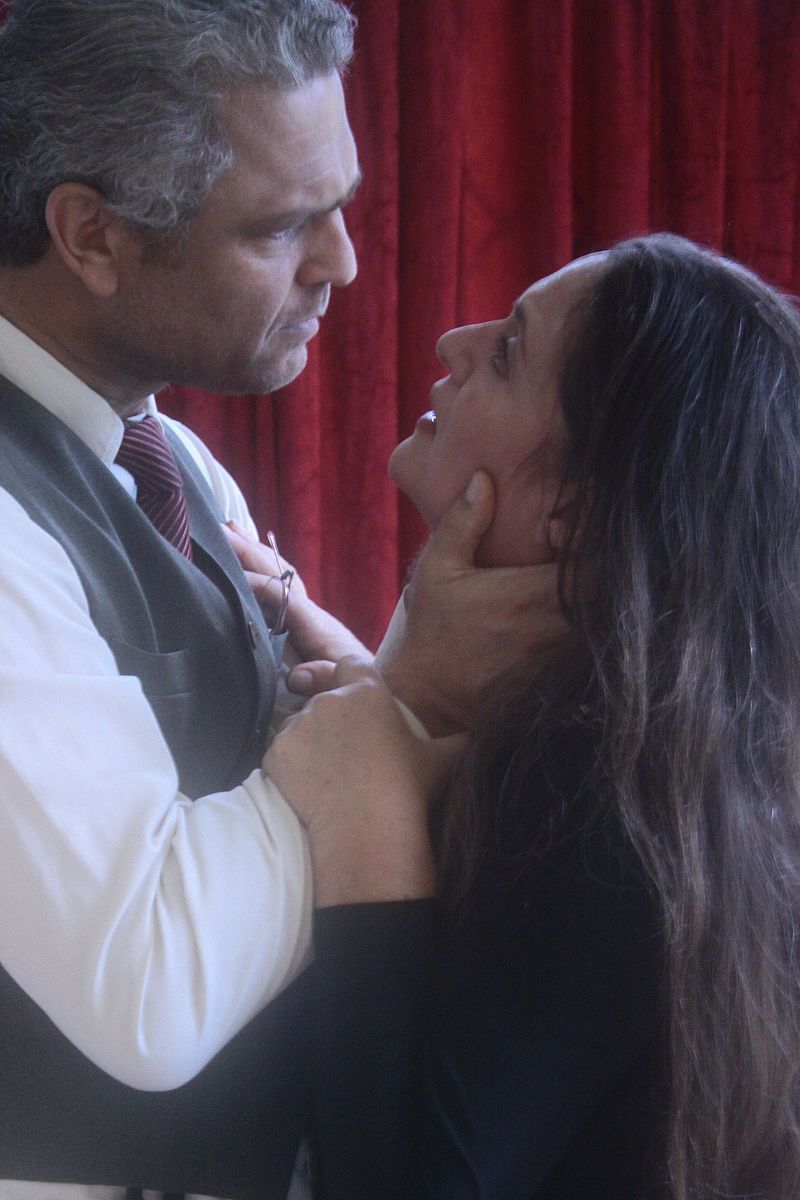 פנינה ברט-צדקה וגדי צדקה בהרופא וגרושתו